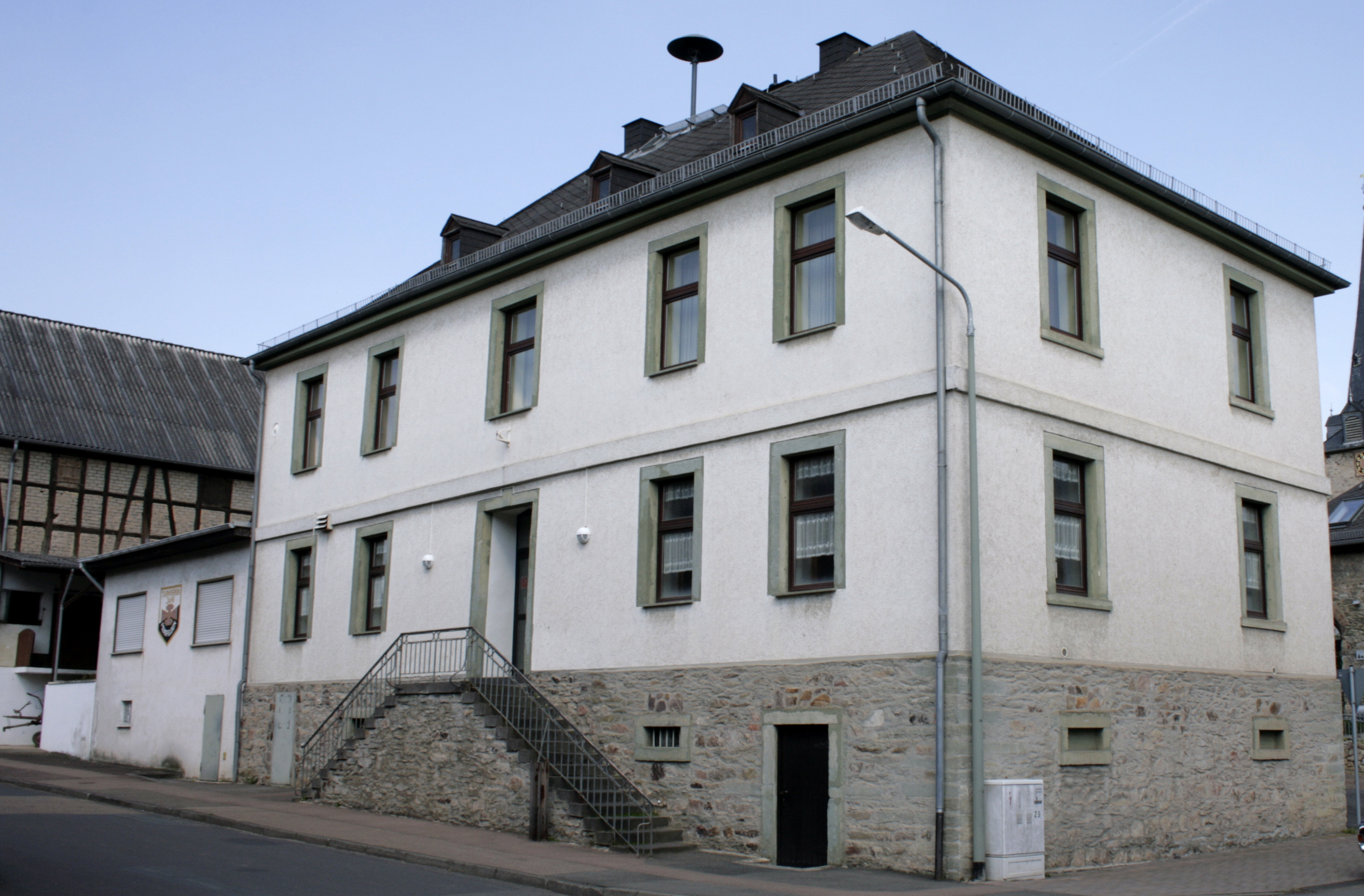 Alte Schule, heute Gemeinschaftshaus in Mensfelden, Deutschland